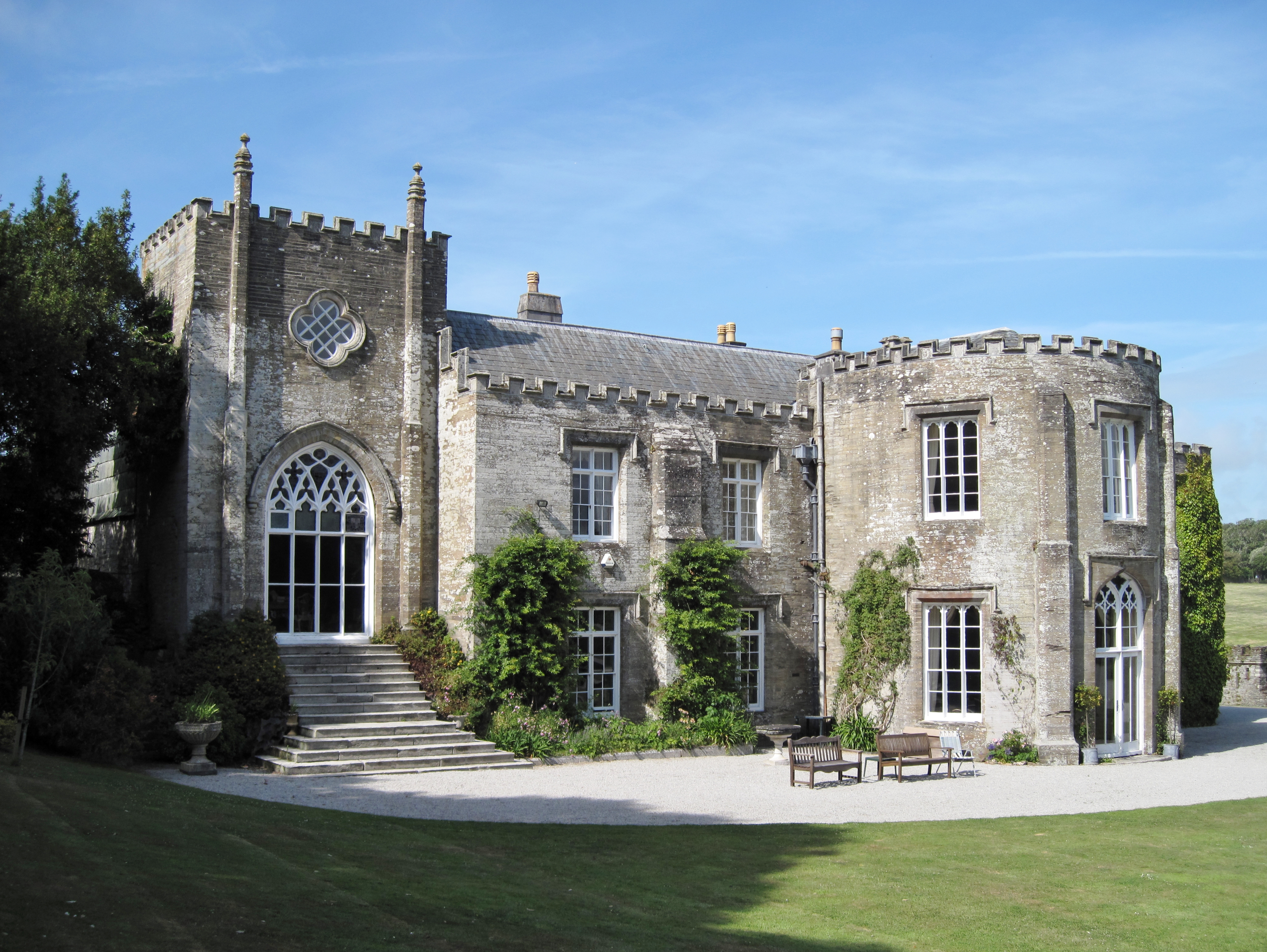 Landsitz Prideaux Place oberhalb der Stadt Padstow, Cornwall, Großbritannien